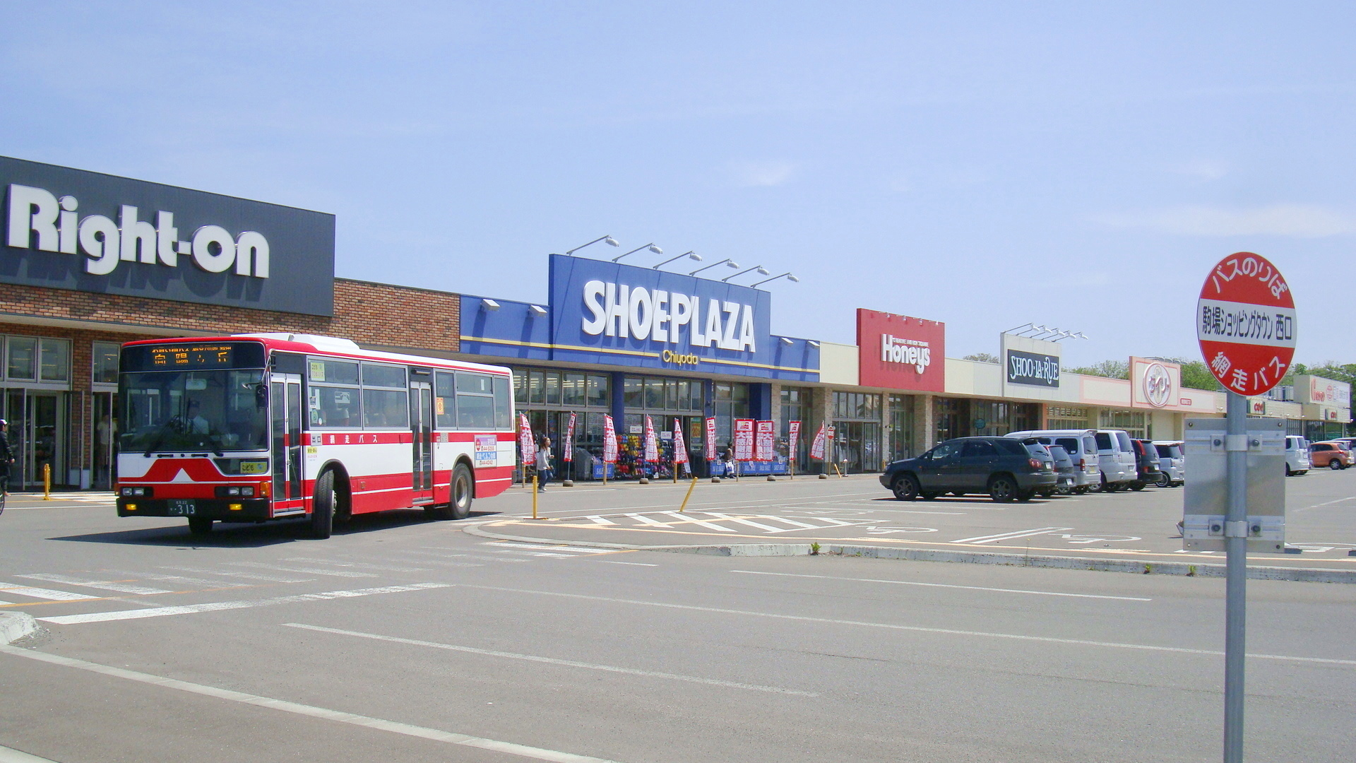 Komaba Shopping Town of Abashiri, Hokkaidō, Japan.